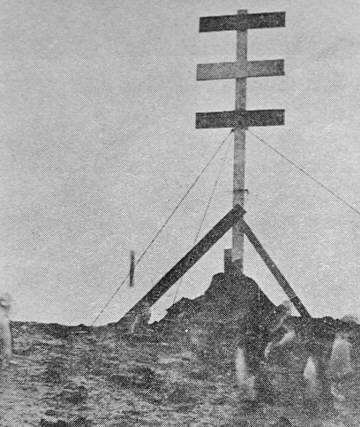 Escaneo de una foto de la Baliza argentina "Gobernación Marítima de Tierra del Fuego" construida en 1955 en cercanías del refugio Teniente Esquivel de las Islas Sandwich del Sur